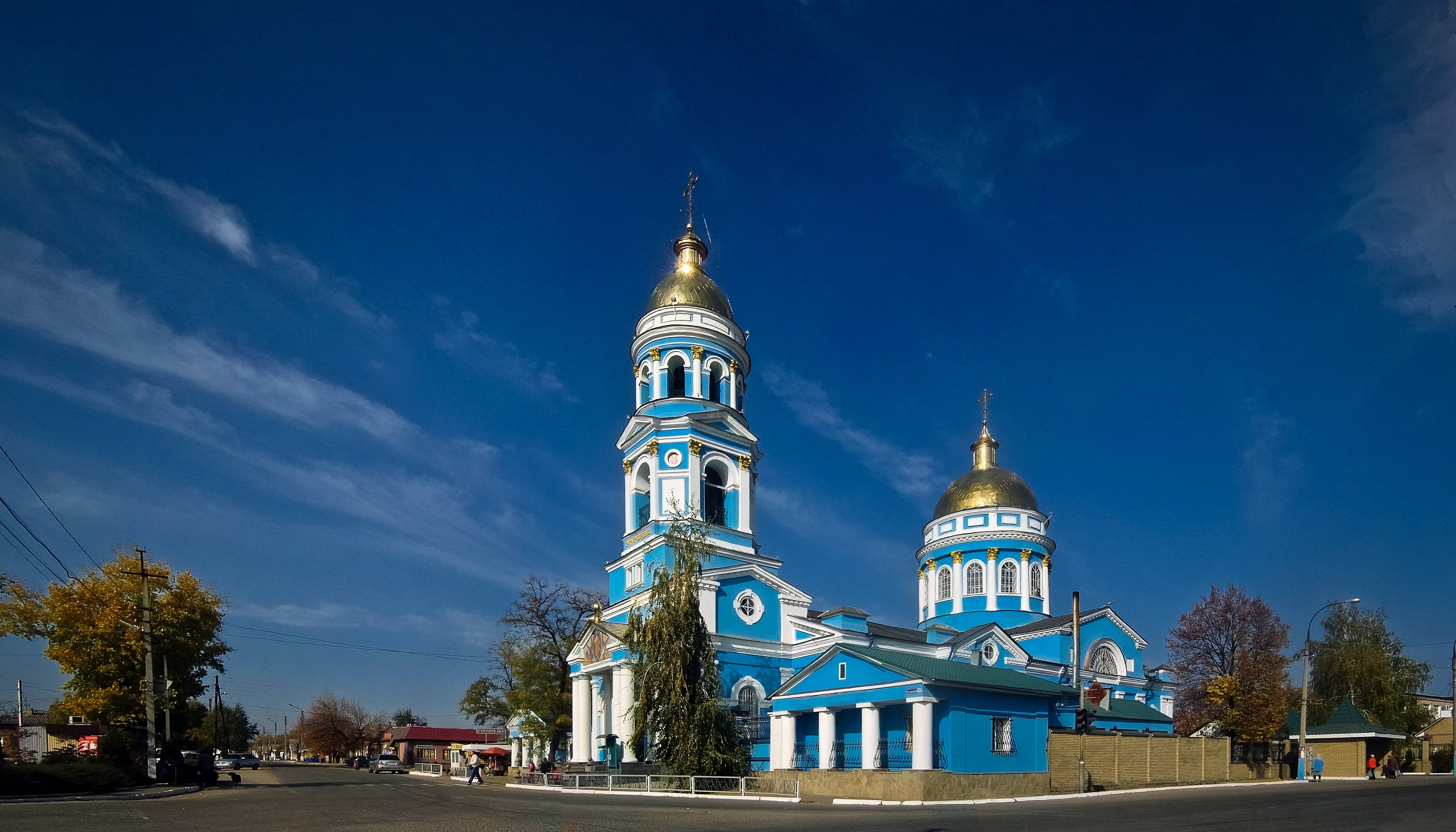 Вознесенська церква з дзвіницею (мур.), Ізюм, вулиця Європейська (Комсомольська), 2